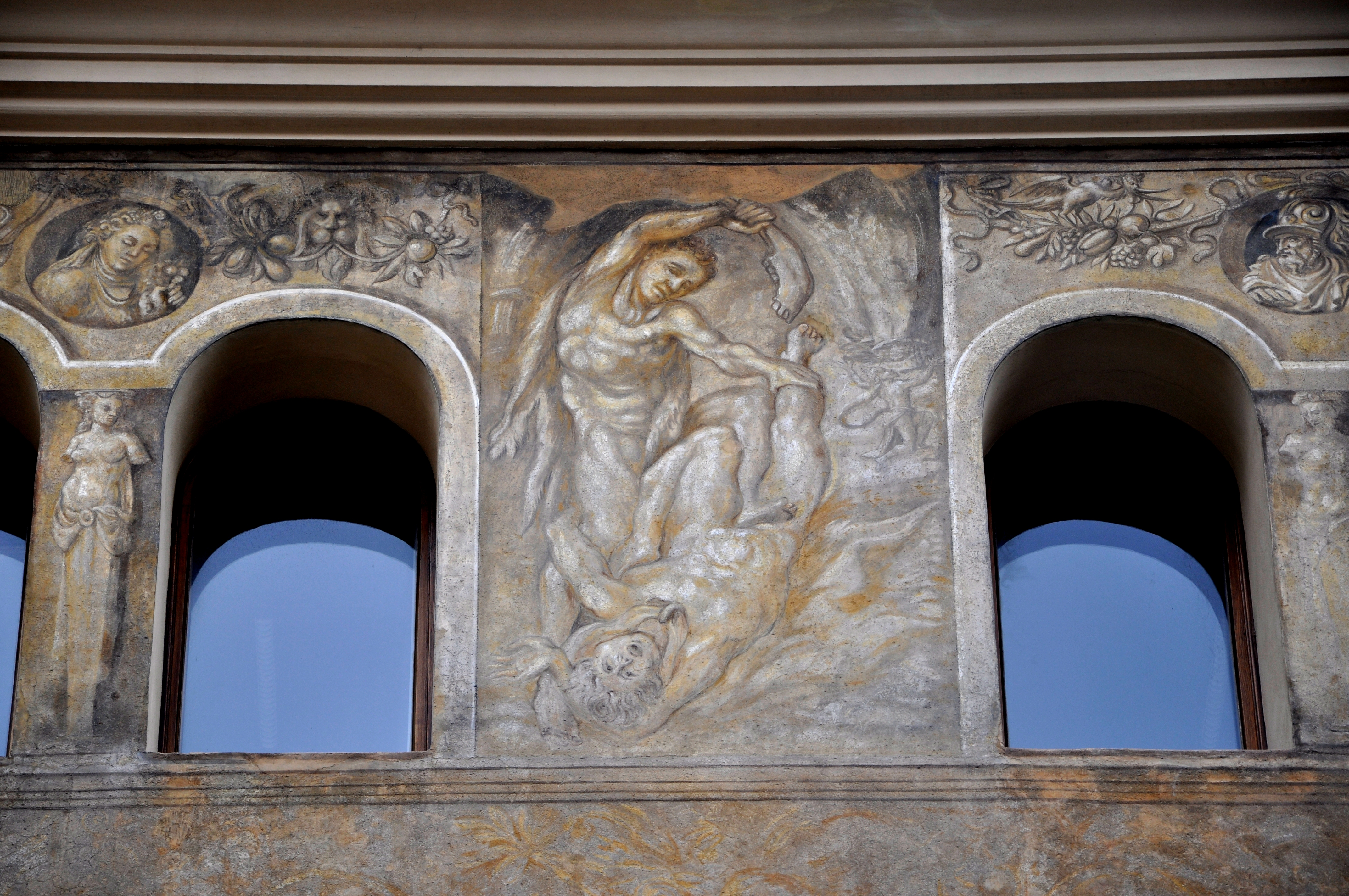 Sgrafitová renesanční výzdoba paláce Granovských v Ungeltu. Jedná se snad o vraždu Abela.